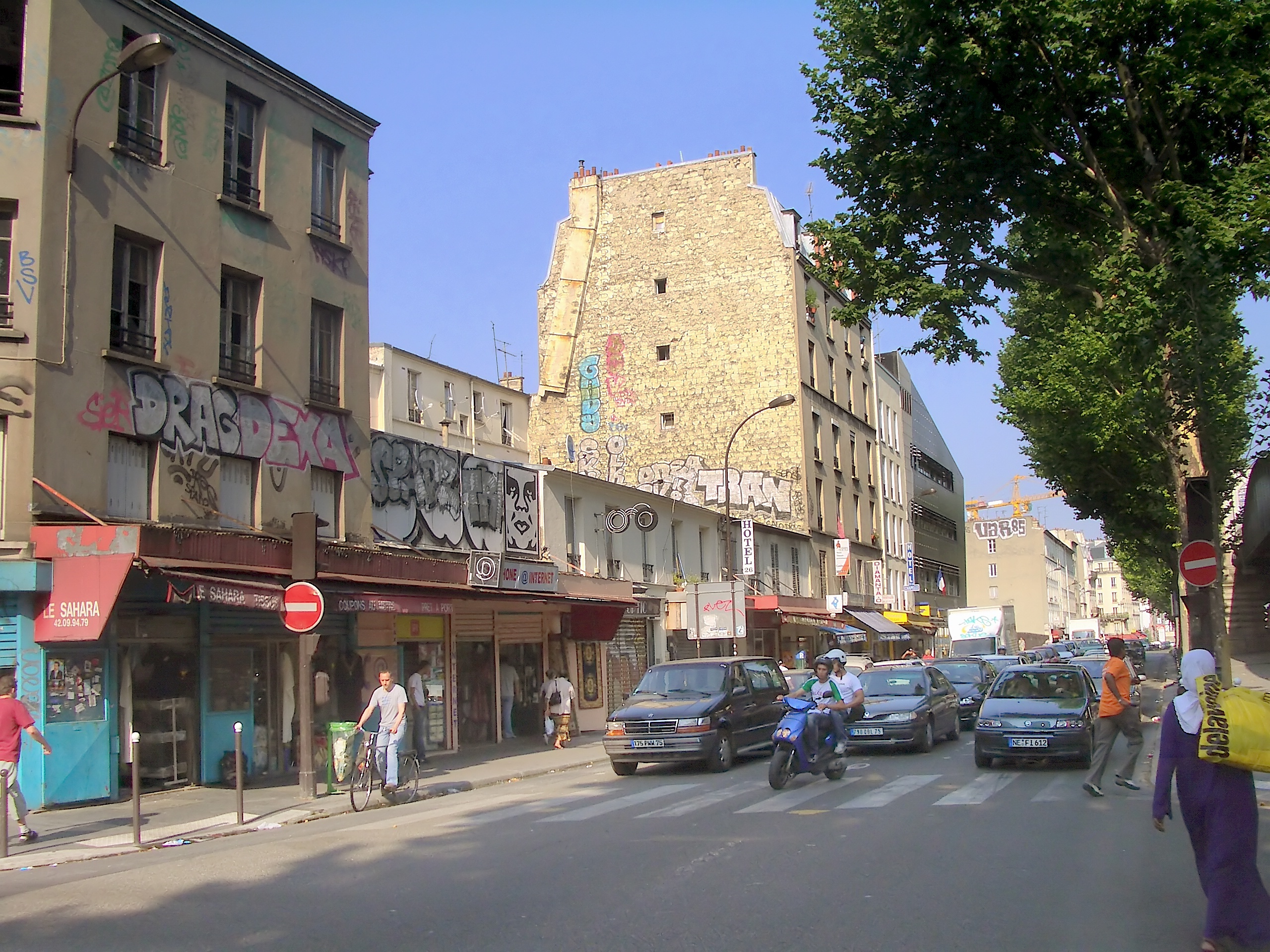 Vue de du Boulevard de la Chapelle dans le quartier parisien de La Chapelle (XVIIIe).